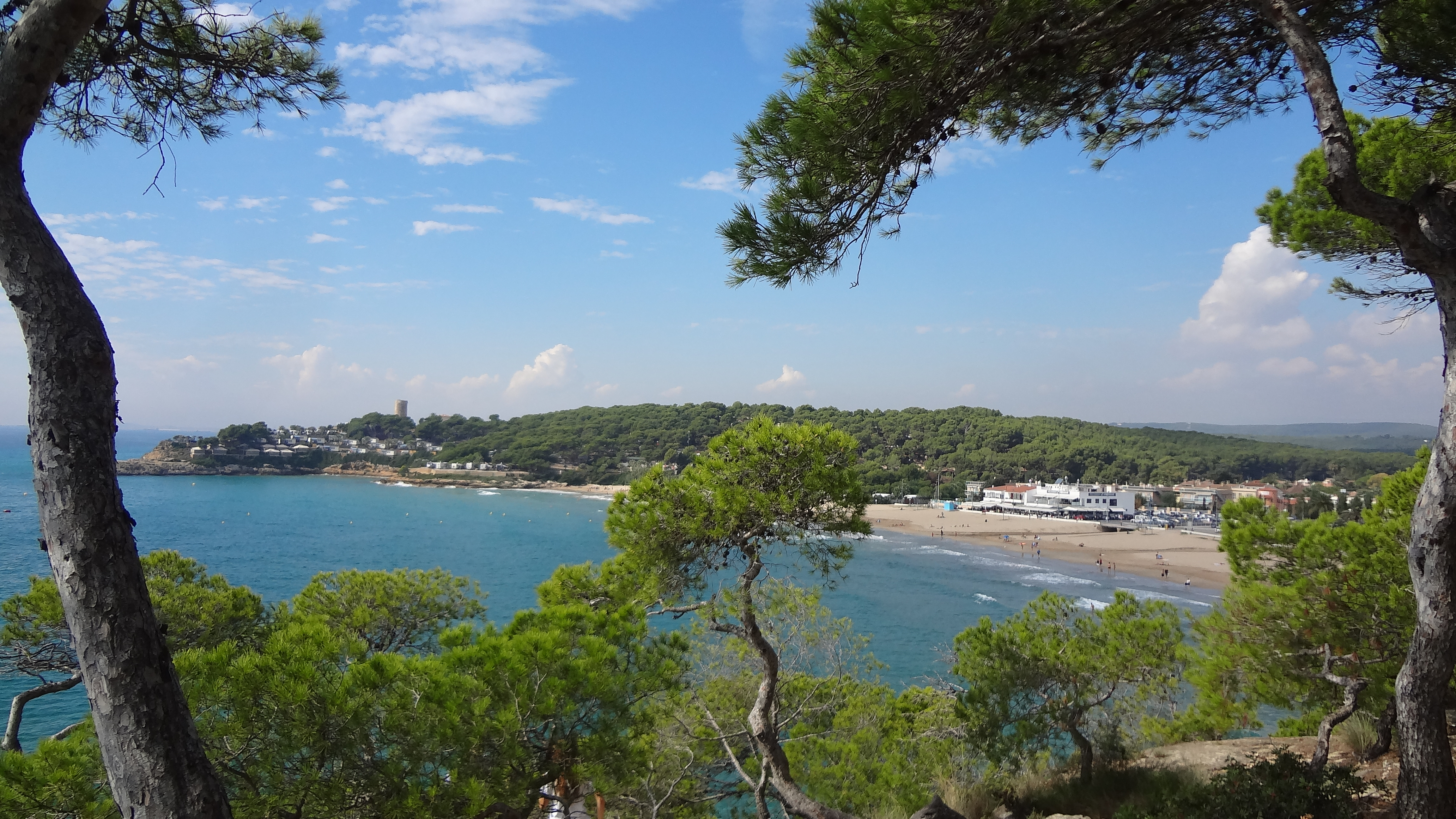 Platja de la Móra (Tarragona) This is a a photo of a beach in Catalonia, Spain, with id: PL-CT-17003-311